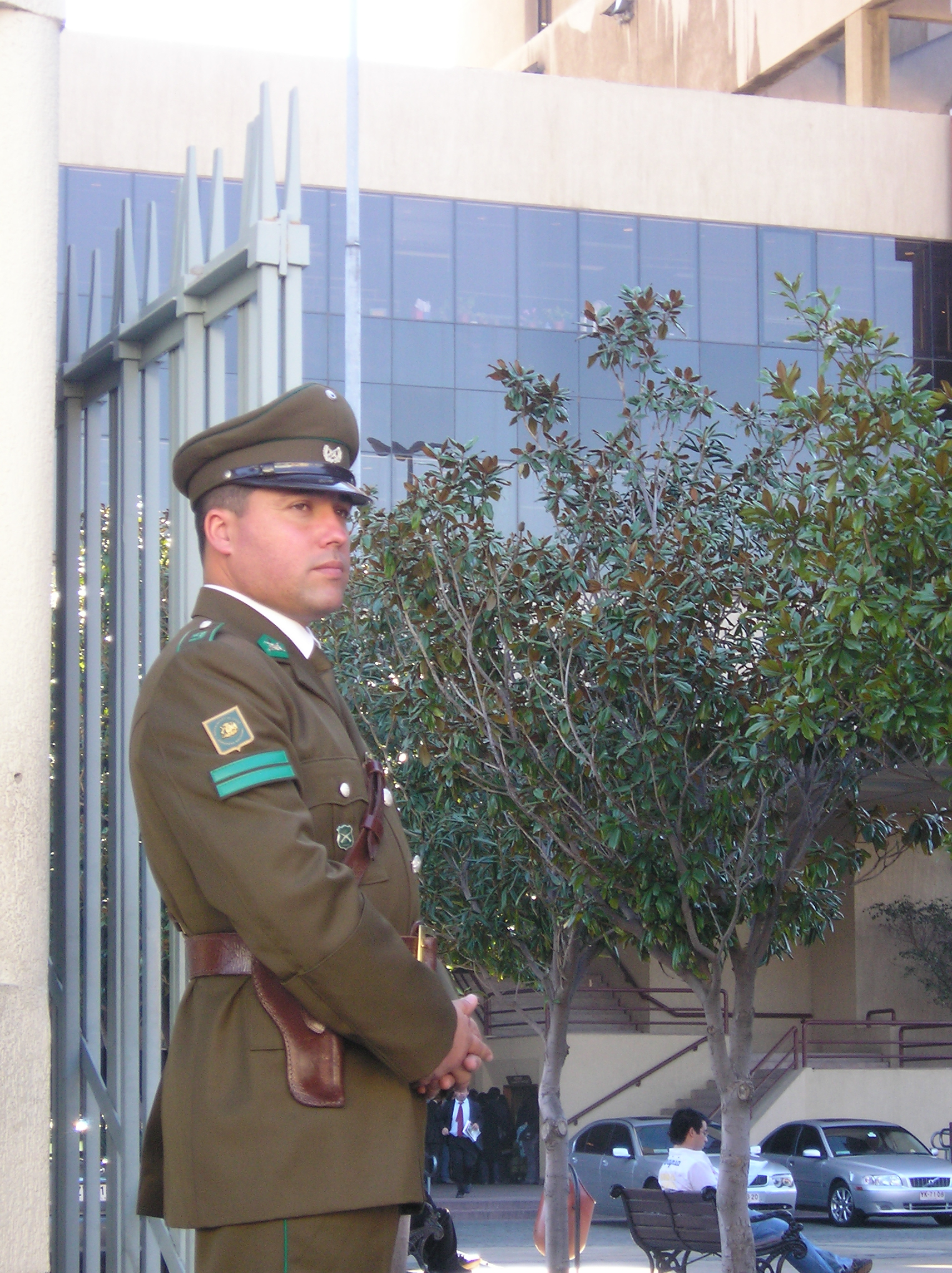 Foto obtenida por el autor el 18 de Julio de 2006 en Valparaíso, Chile.